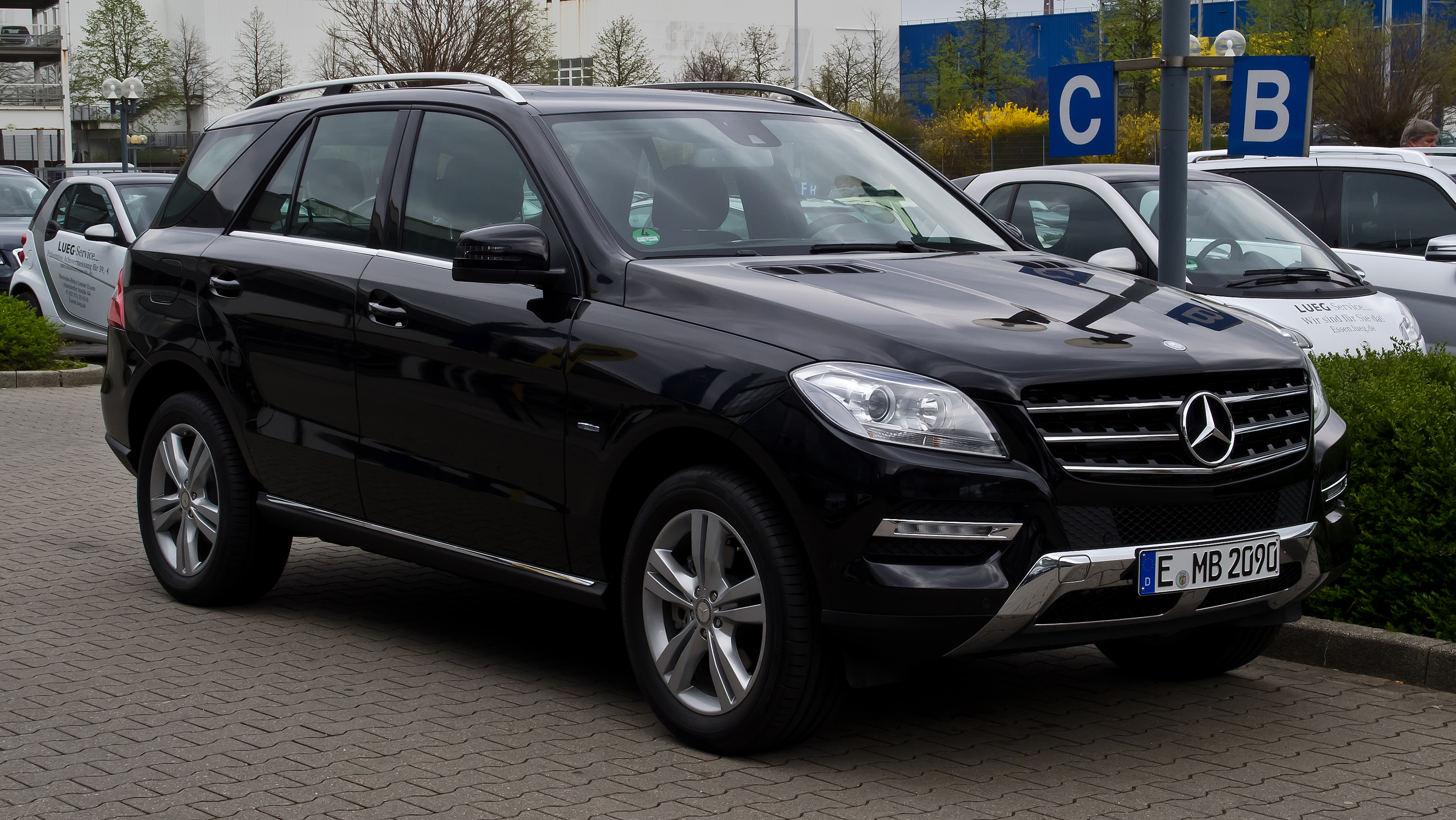 Mercedes-Benz ML 250 BlueTEC 4MATIC (W 166)